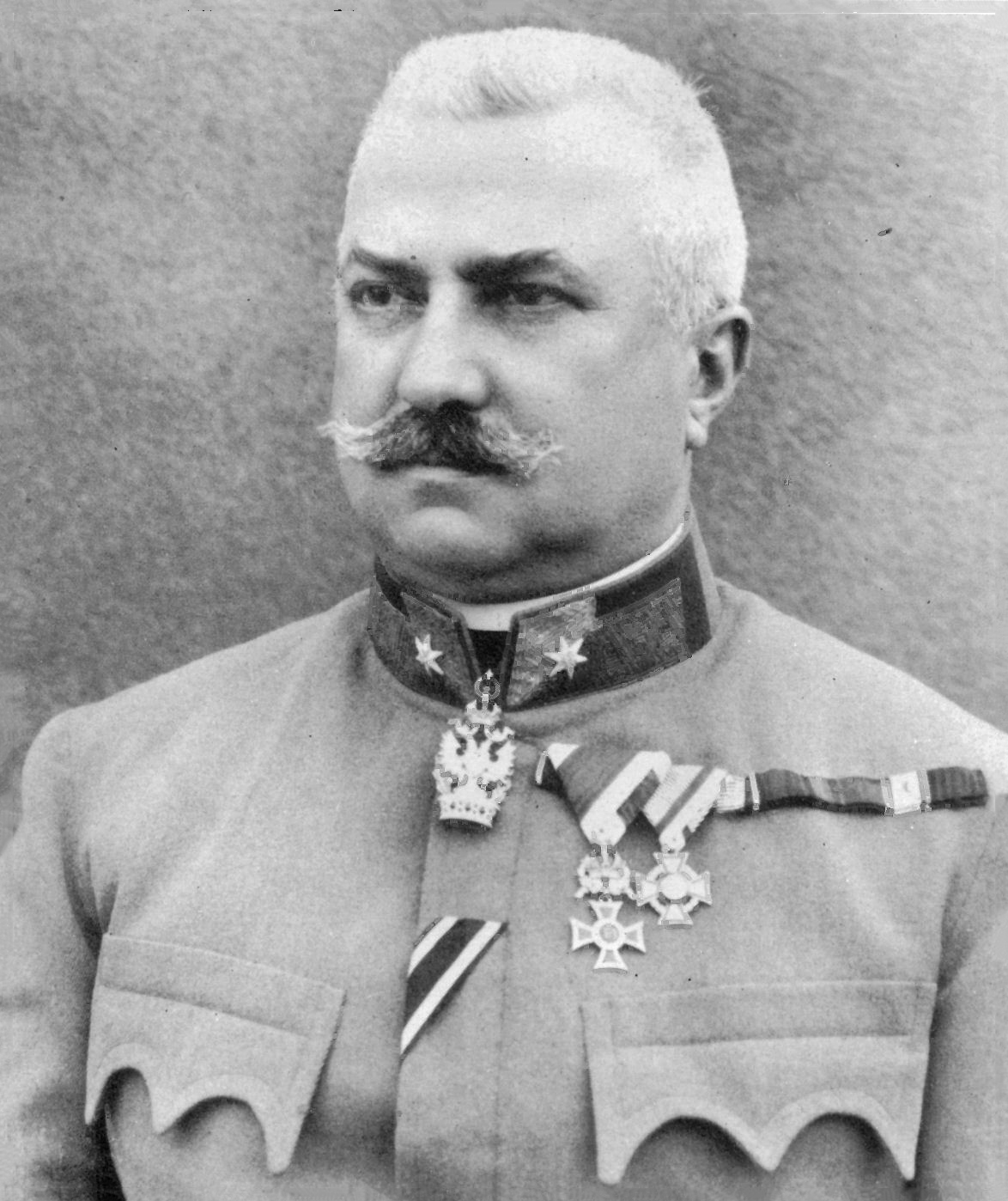 General Stanisław Puchalski